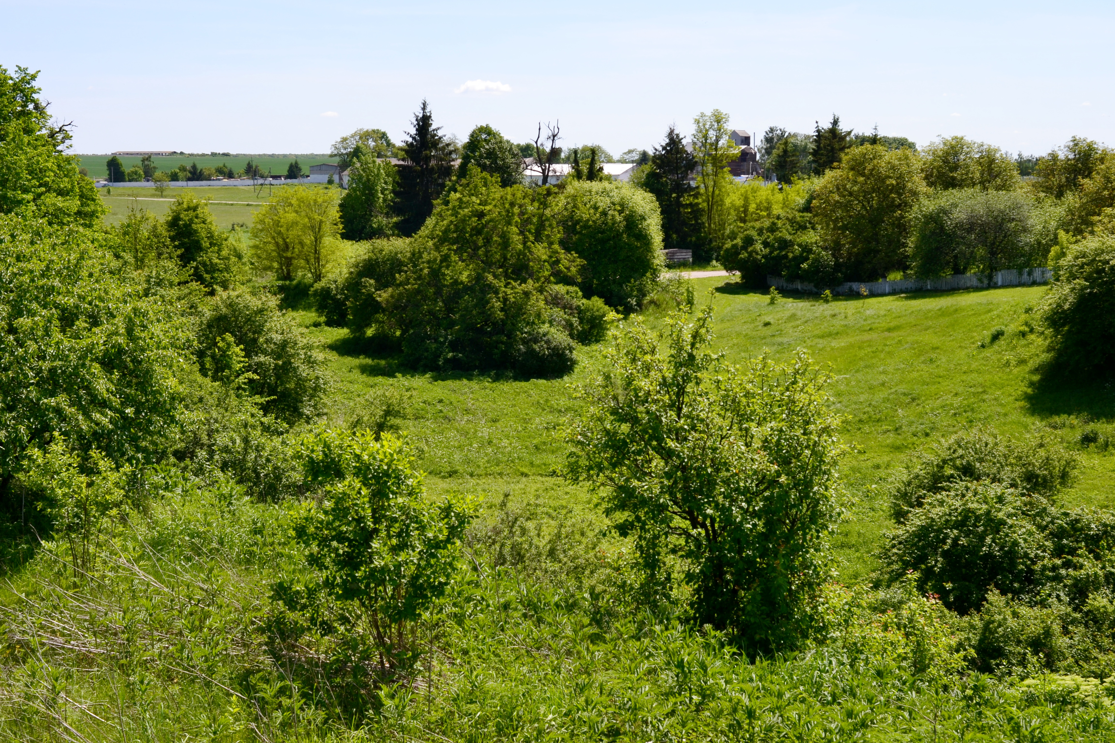 Шепель-3, стоянка доби фінального палеоліту - Шепель (на західній околиці села, поблизу городища) Луцький район Волинська область Україна